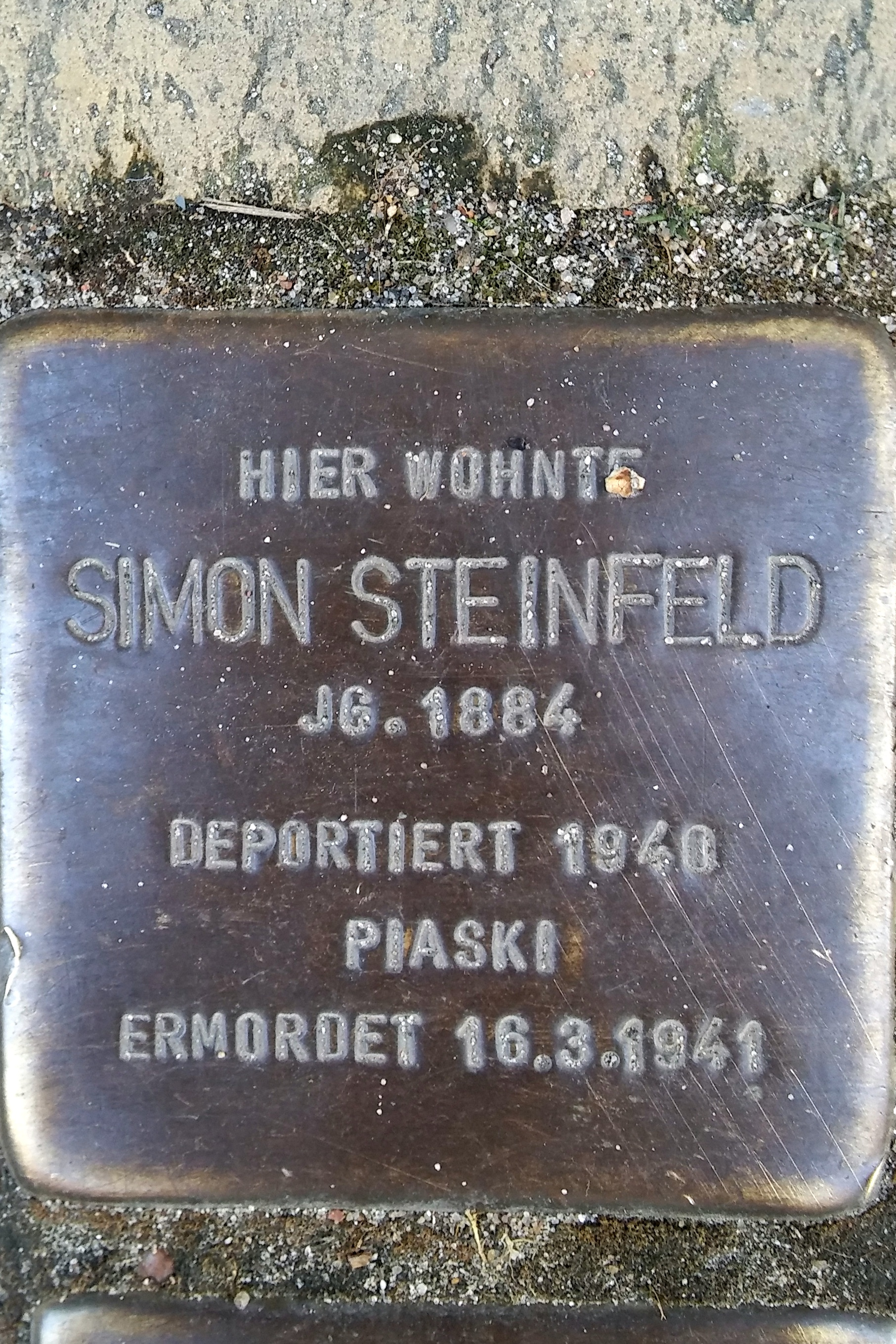 Stralsund, Frankenstraße 43, Stolperstein Simon Steinfeld